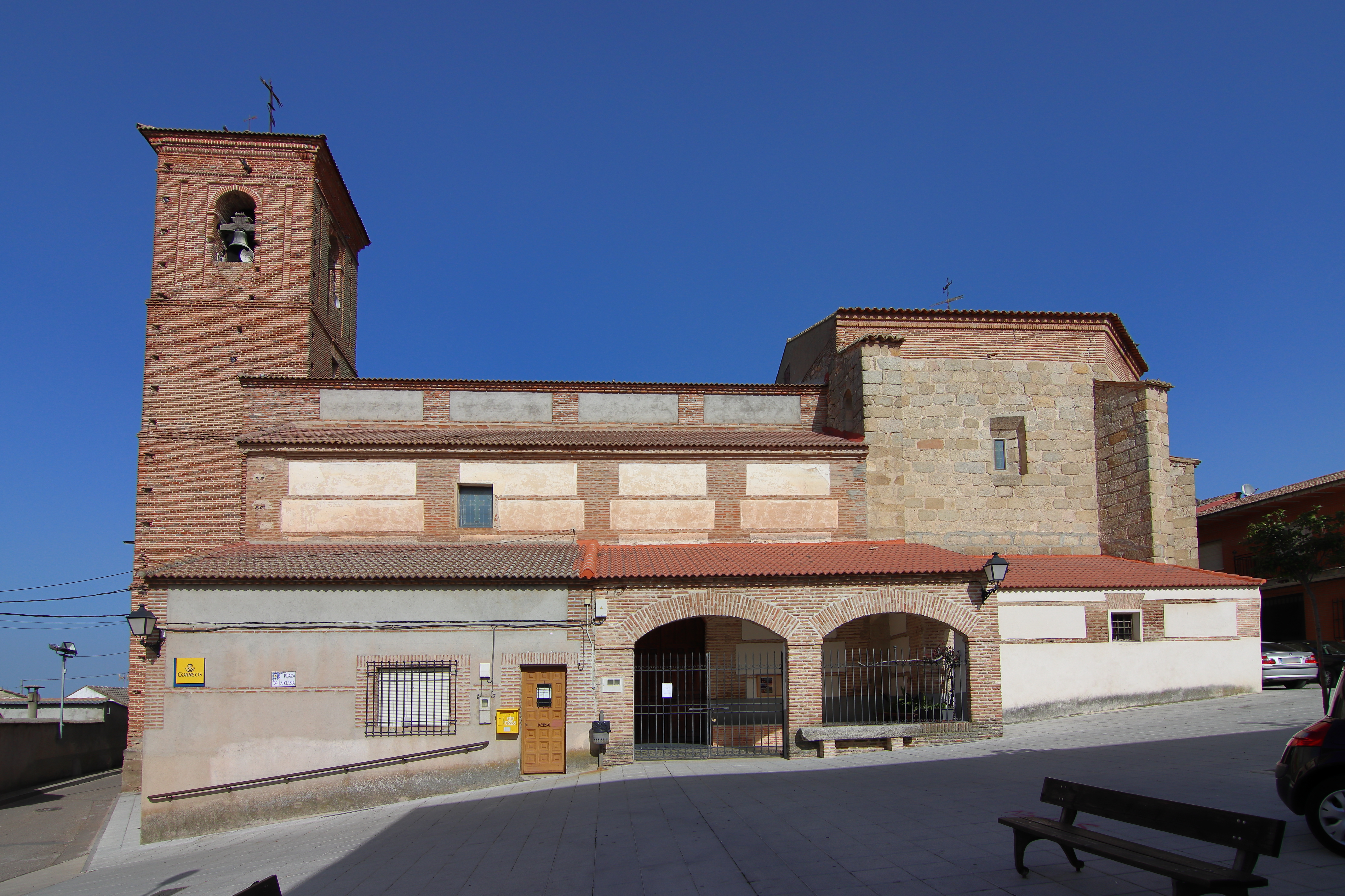 Iglesia de San Bartolomé, Hormigos, fachada principal